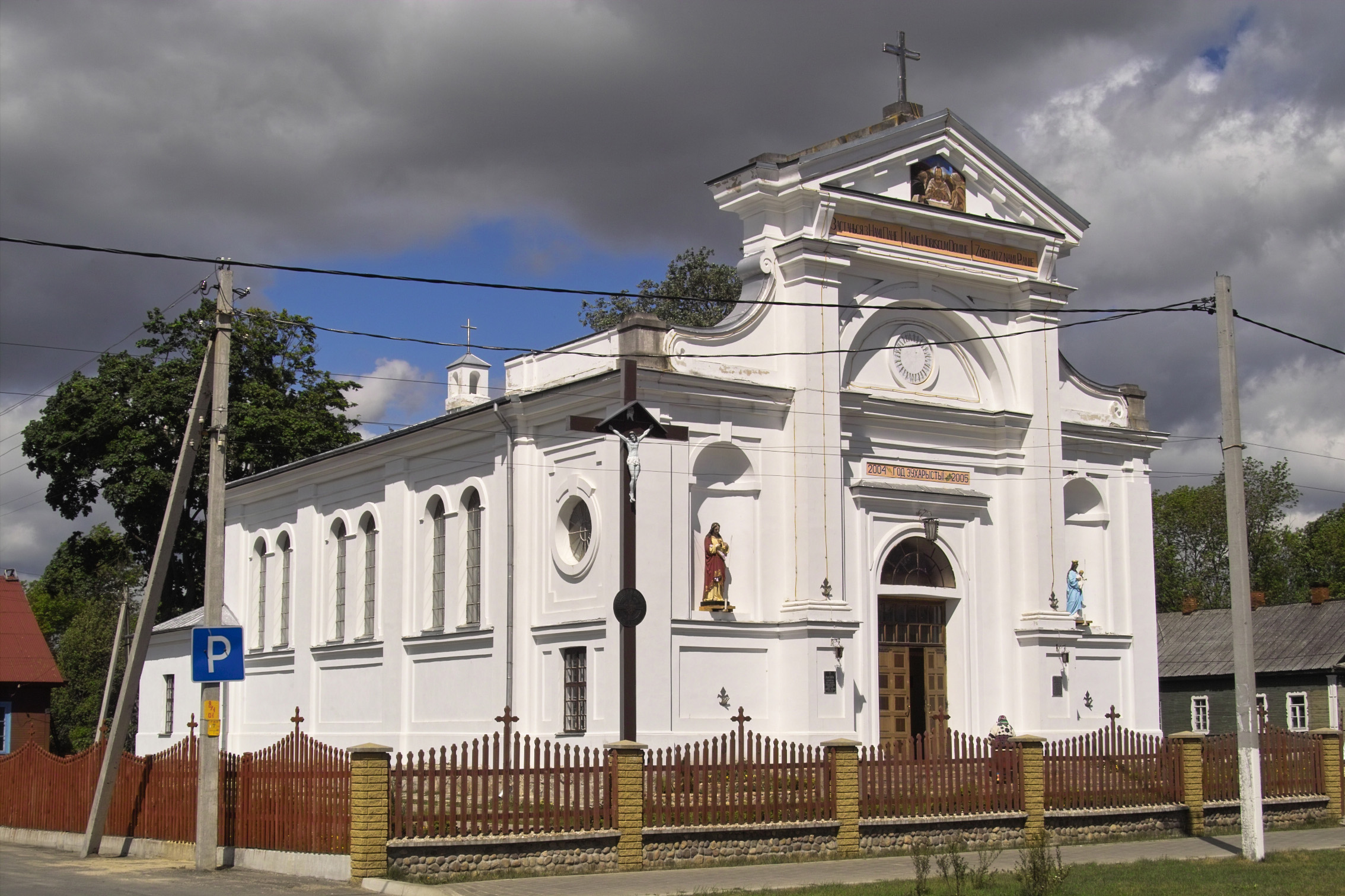 Беларуская (тарашкевіца): Касьцёл Унебаўзяцьця Сьвятой Дзевы Марыі. г. Пружаны This is a photo of Belarusian heritage monument. Reference number: 113Г000591 ( WLM)